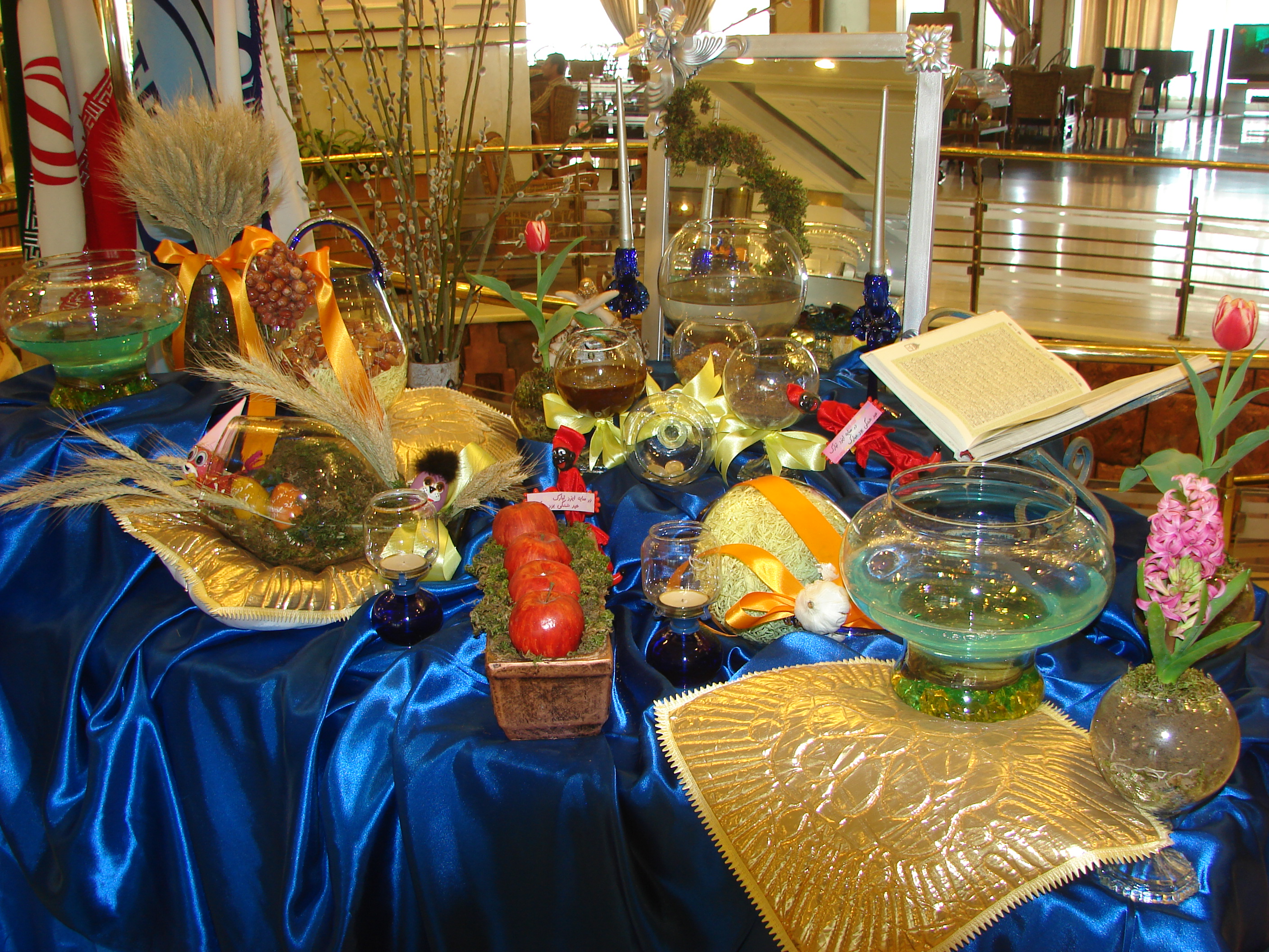 Sofre Haft-Sin, Laleh Hotel, Tehran.